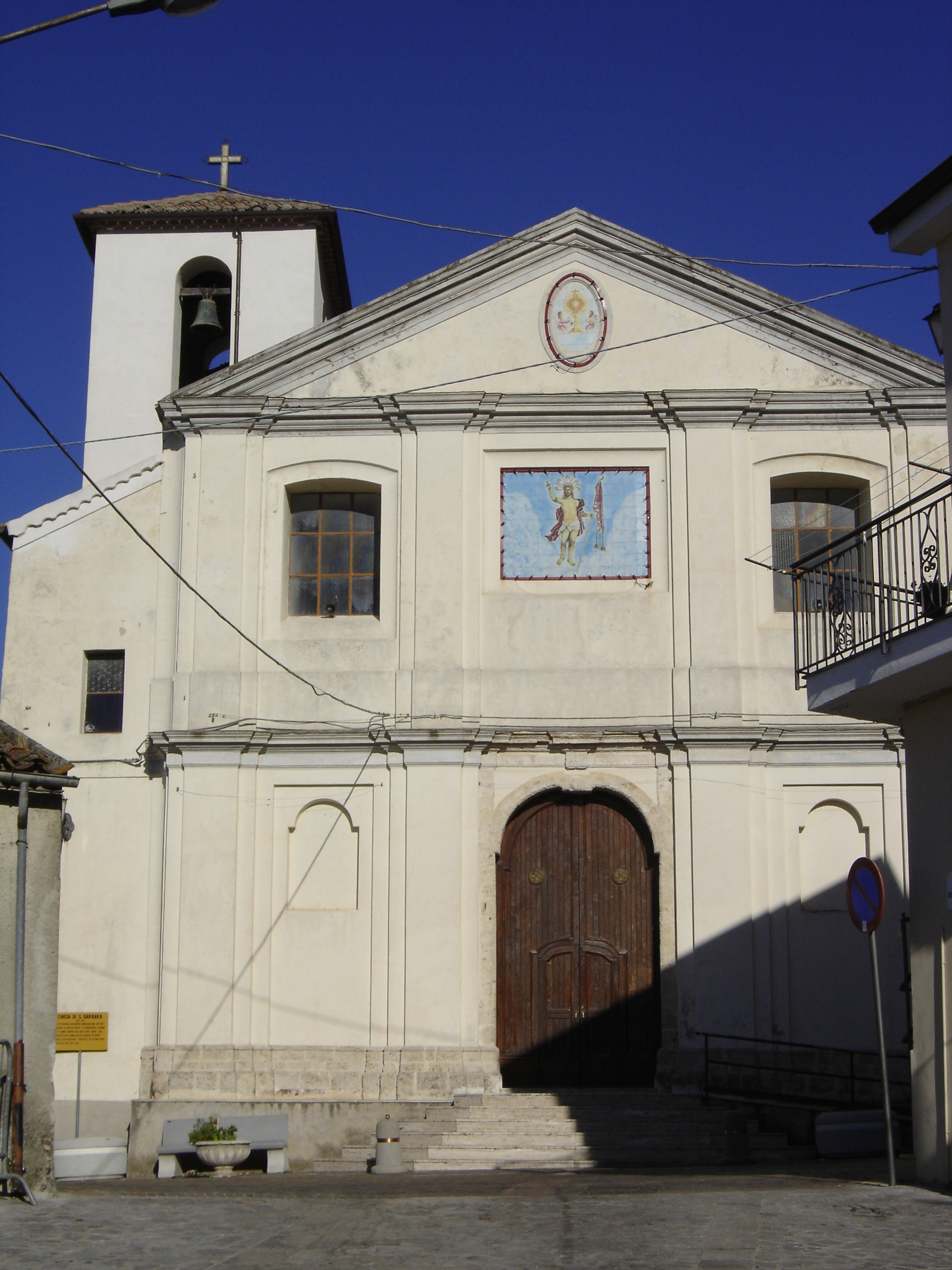 Facciata della Chiesa di Santa Barbara, Taverna (CZ)